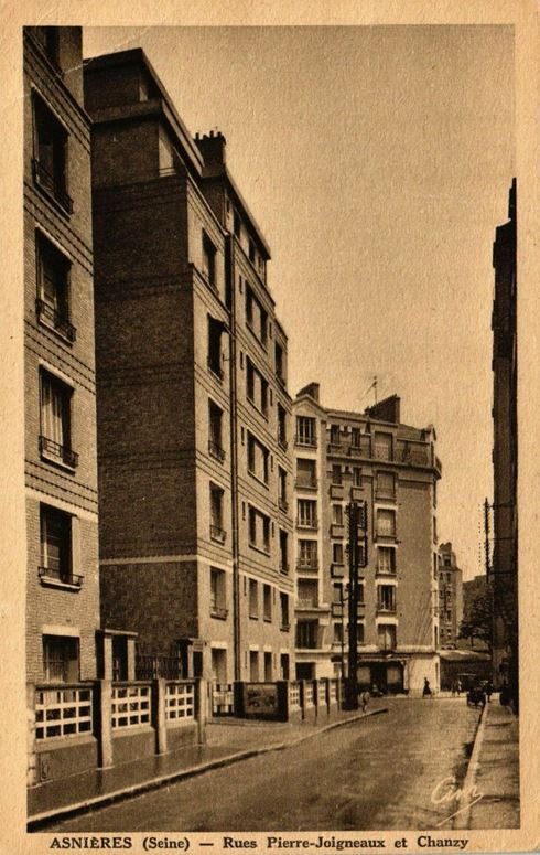 Asnières-sur-Seine.Rue Pierre-Joigneaux.Rue Chanzy